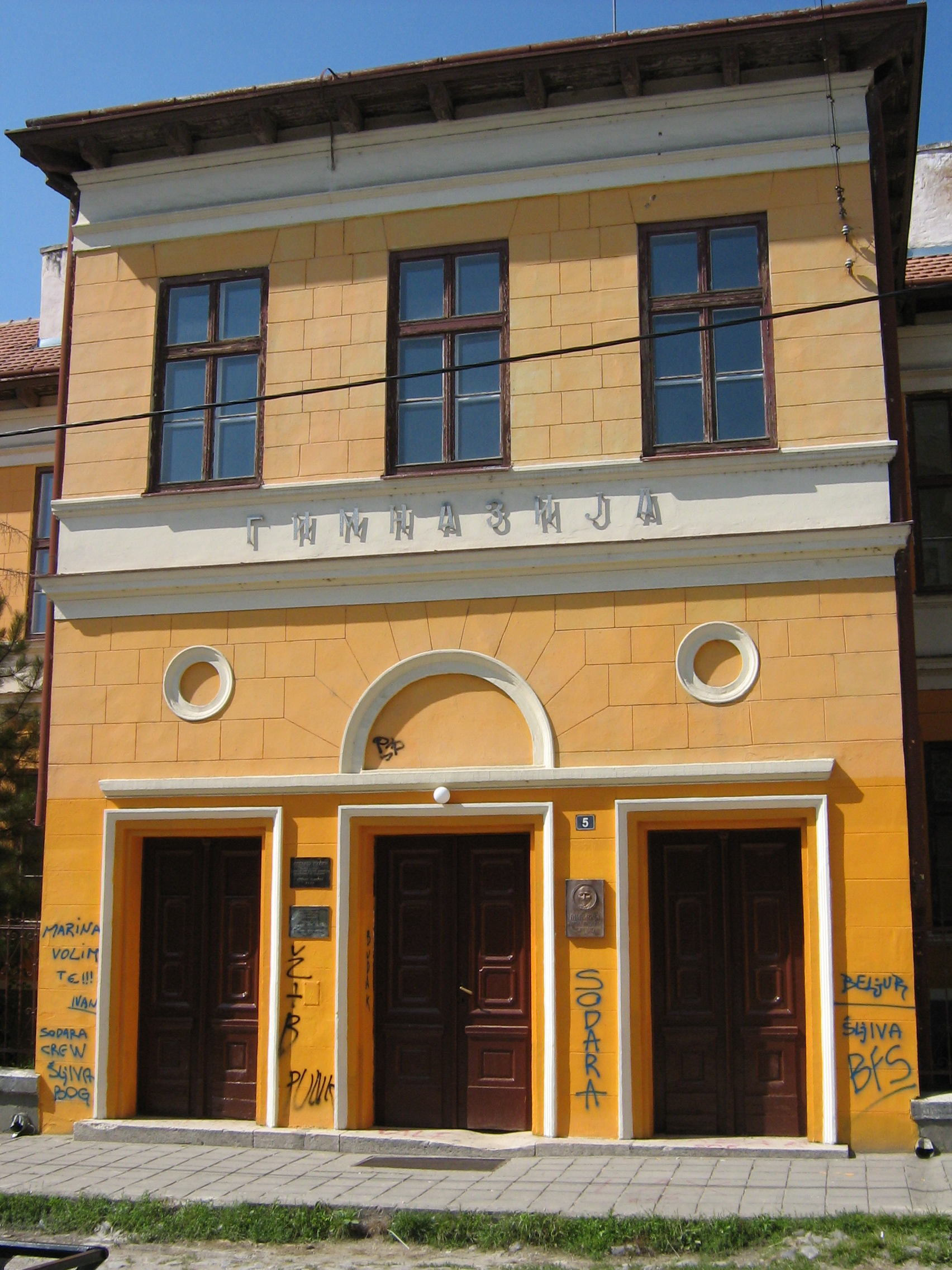 Gymnasium „Uroš Predić“ in Pančevo